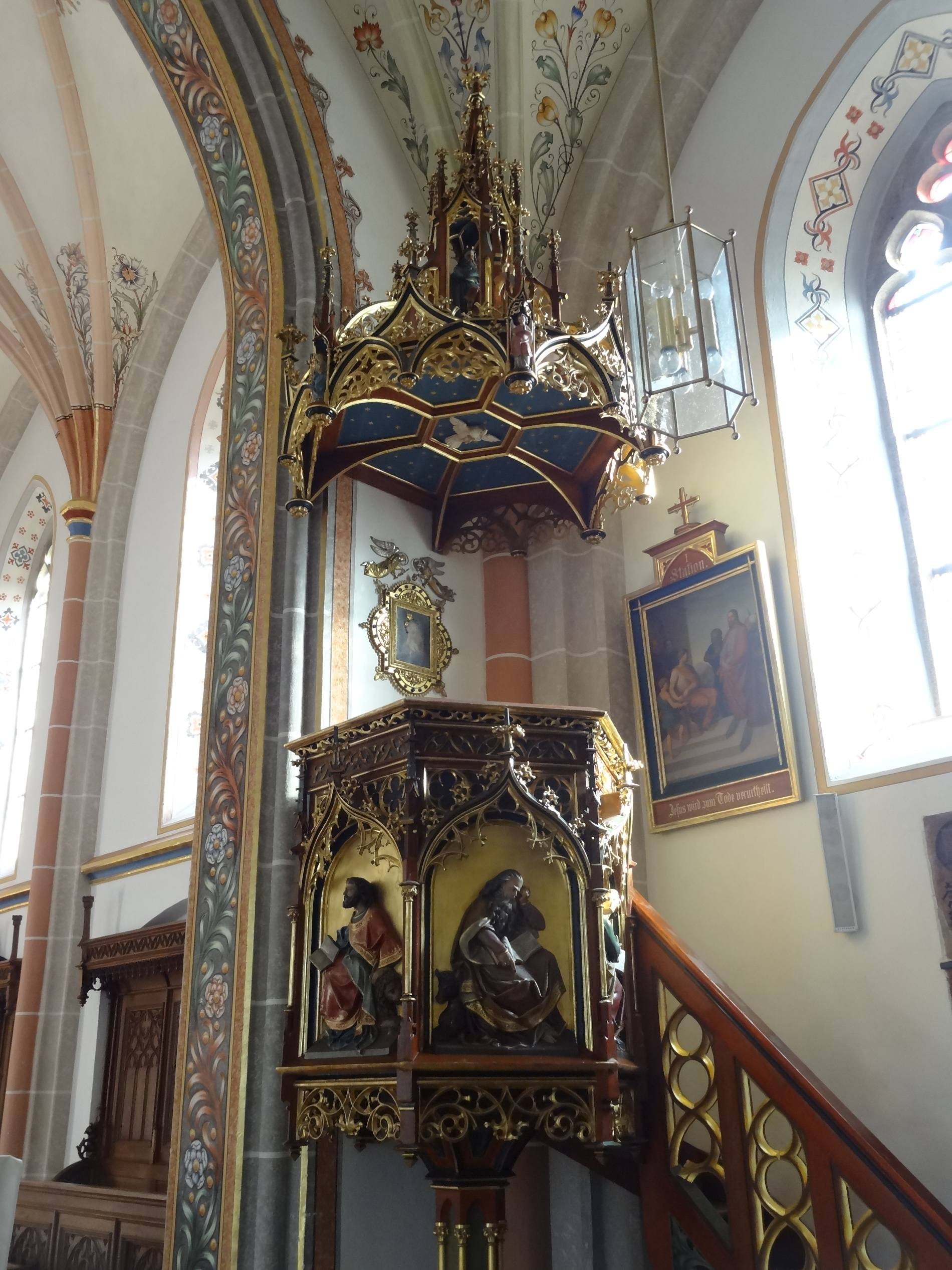 Neugotische Kanzel der Pfarrkirche St. Johann in Seyboldsdorf (Stadt Vilsbiburg, Lkr. Landshut)